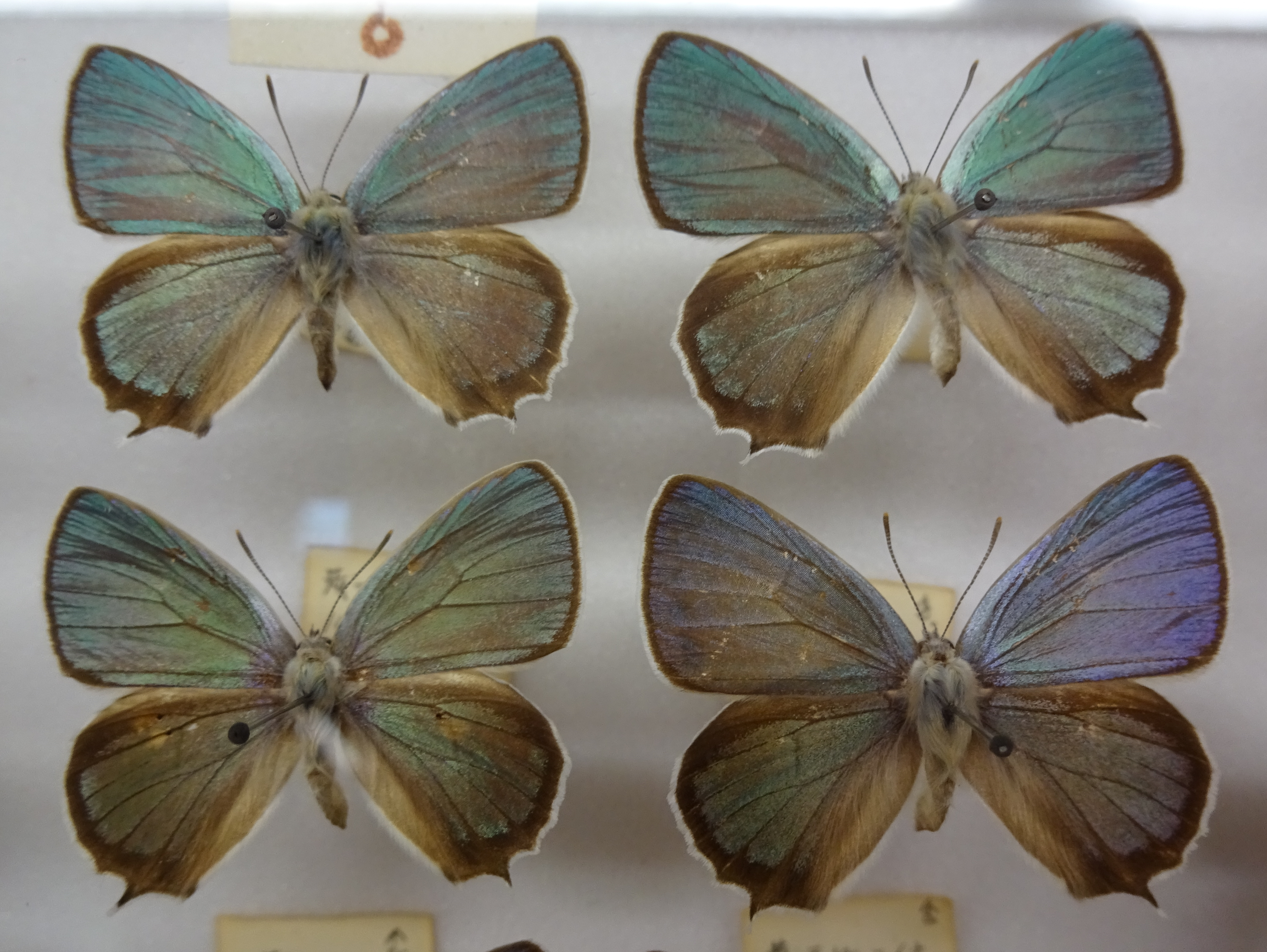 ウラジロミドリシジミ